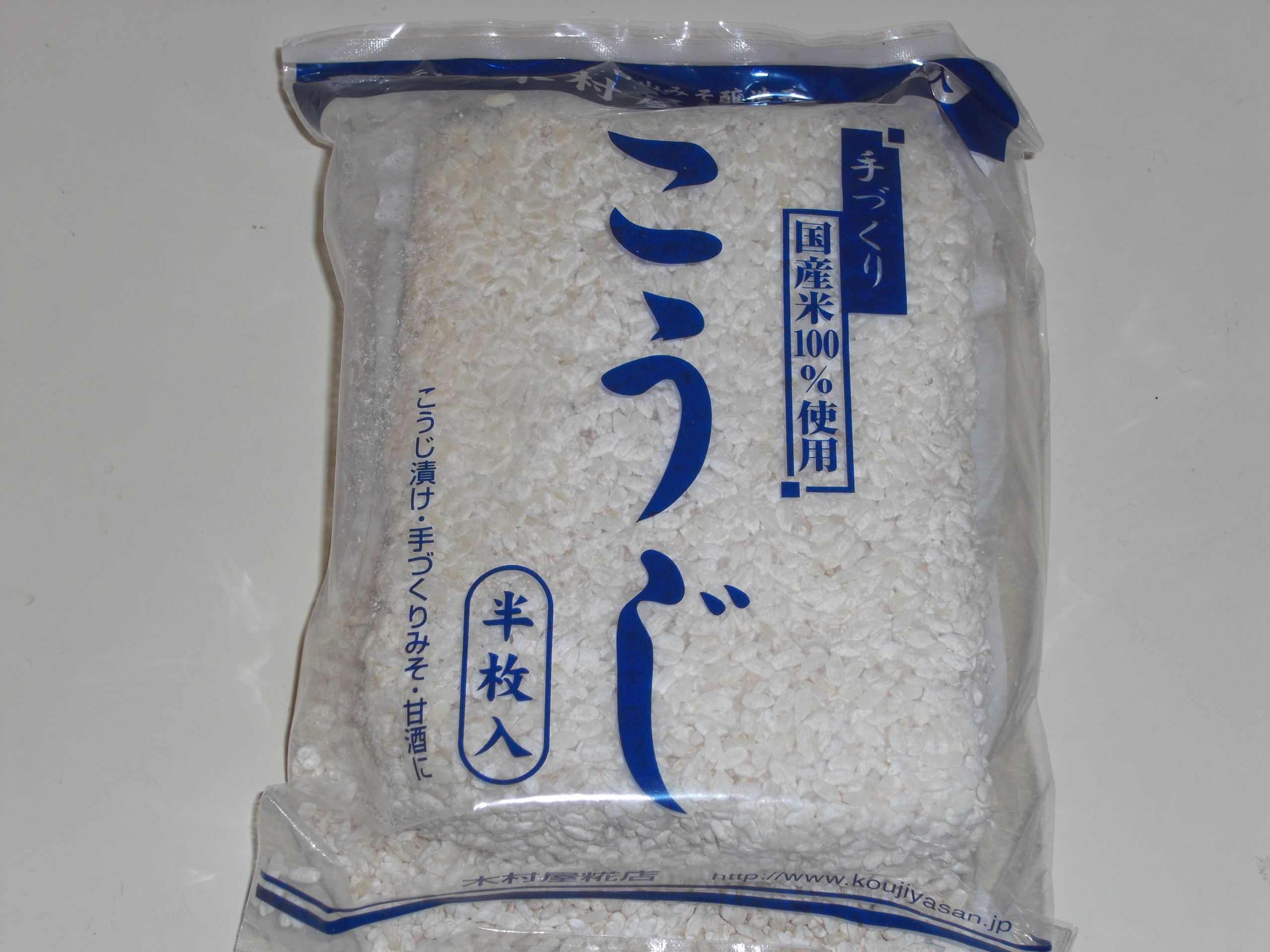 米麹 こめこうじ